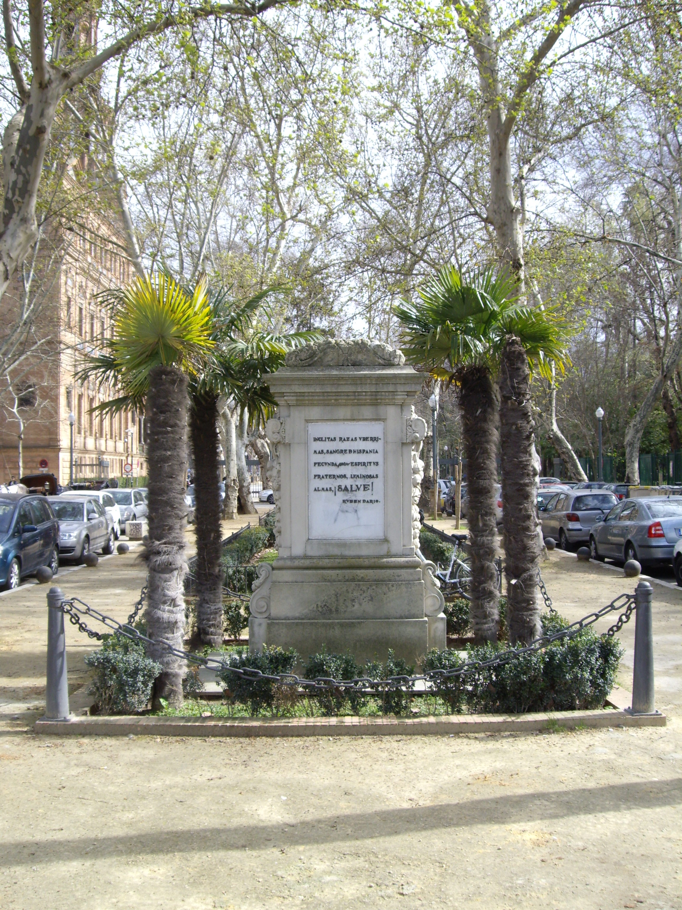 Monumento a la Raza en Sevilla colocado para la Exposición de 1929